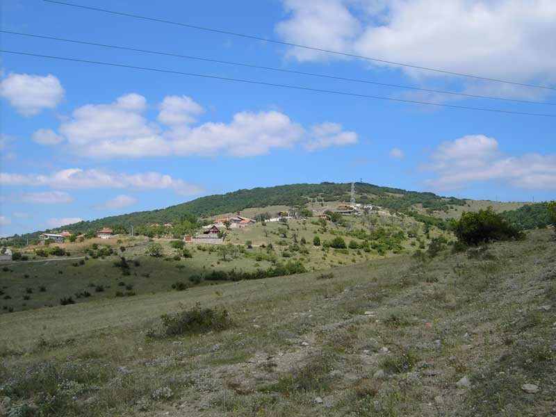 Emona, Black sea, Bulgaria